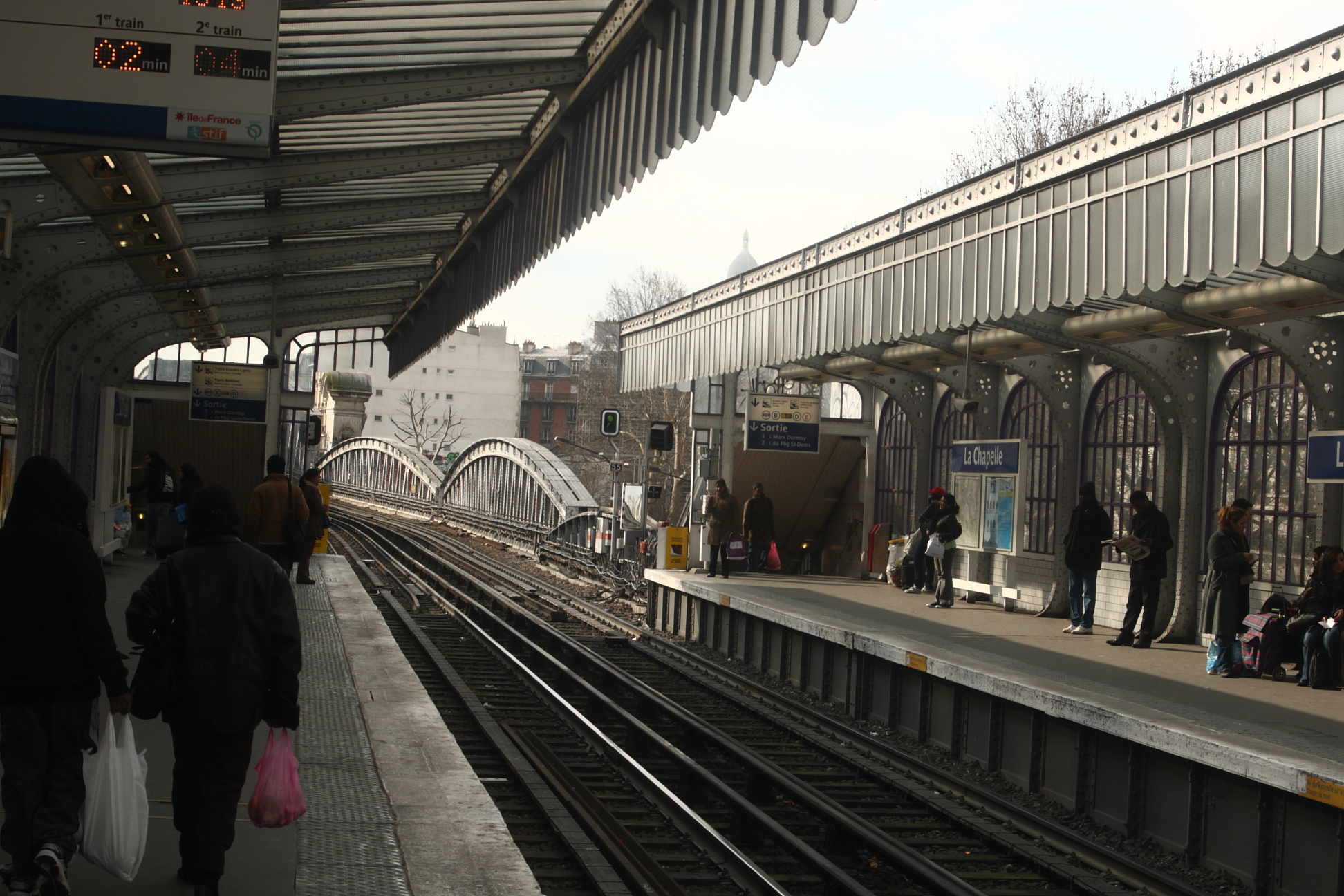 La Chapelle Metro Station